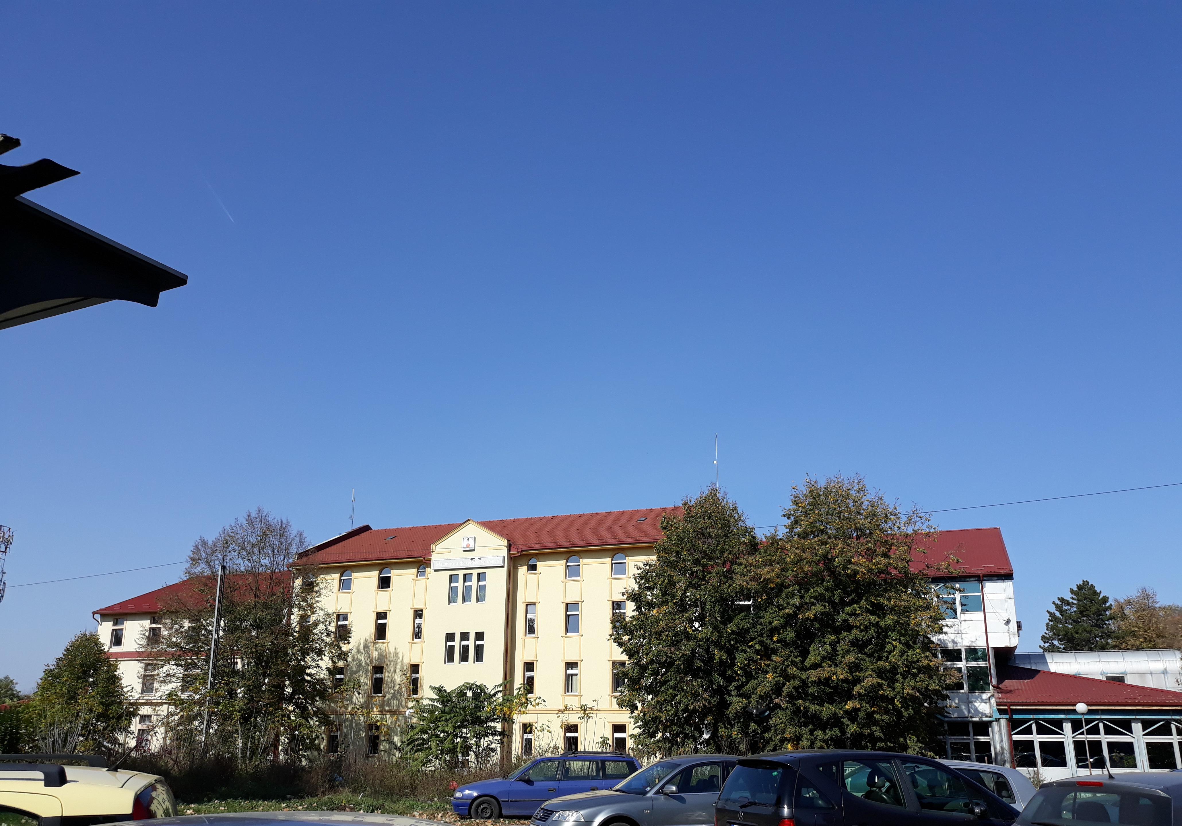 Зграда Факултета за машинство и грађевинарство Универзитета у Краљеву